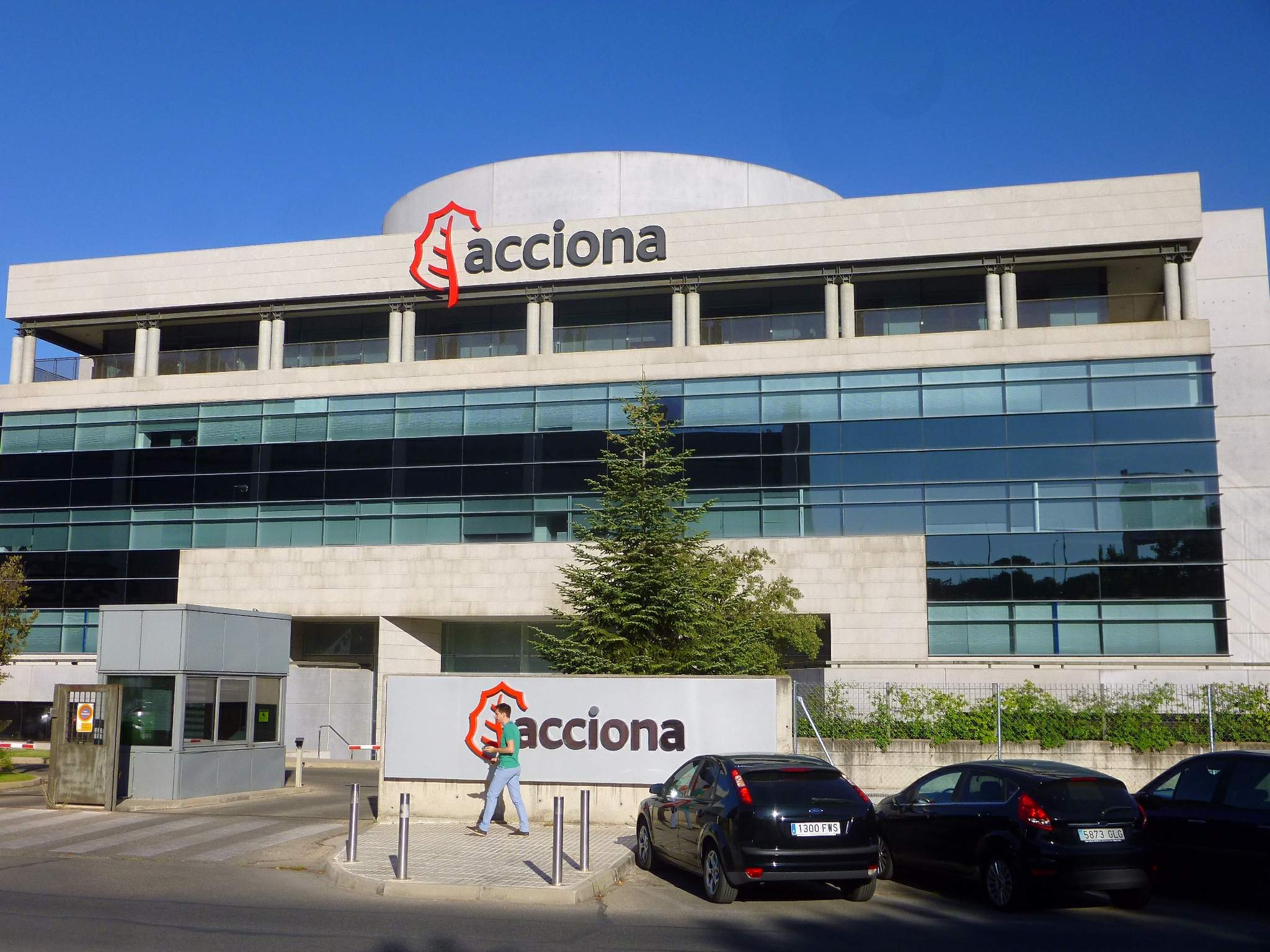 Alcobendas - La Moraleja, Parque Empresarial La Moraleja, Oficinas de Acciona